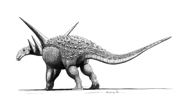 The ankylosaurid dinosaur Sauropelta